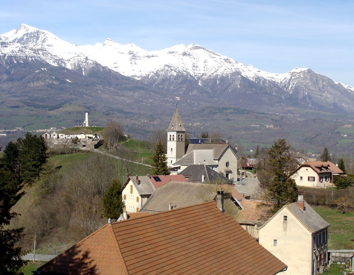 Laye-chef-lieu ; au fond, le Vieux-Chaillol